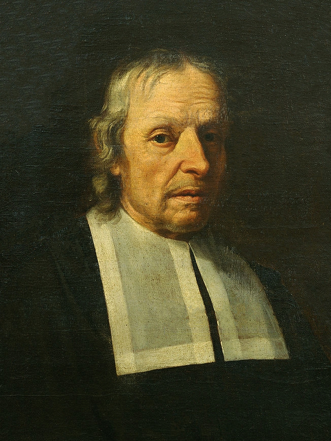 Marcello Malpighi, oil on canvas